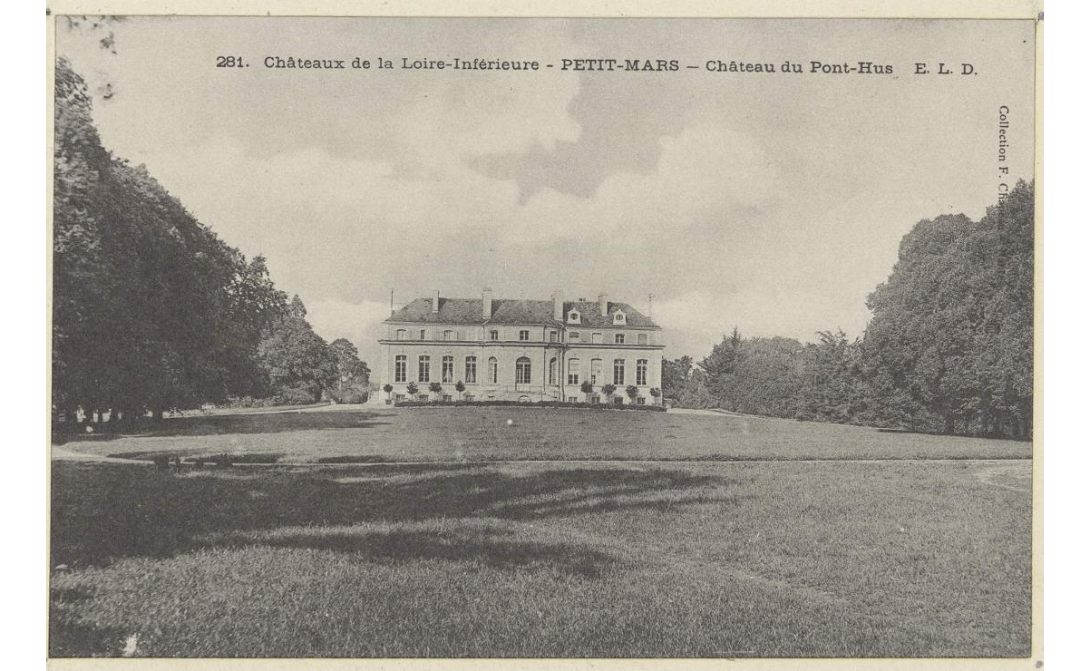 Petit-Mars - Château du pont-Hus